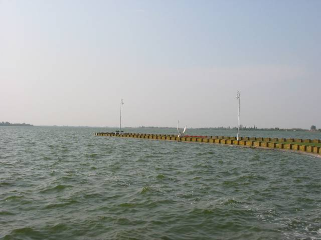 Palić